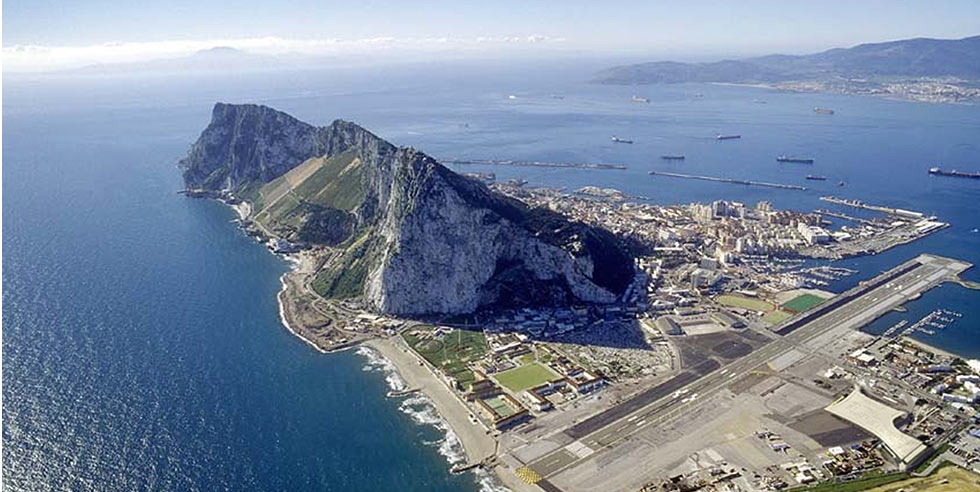 Vista del Peñón de Gibraltar